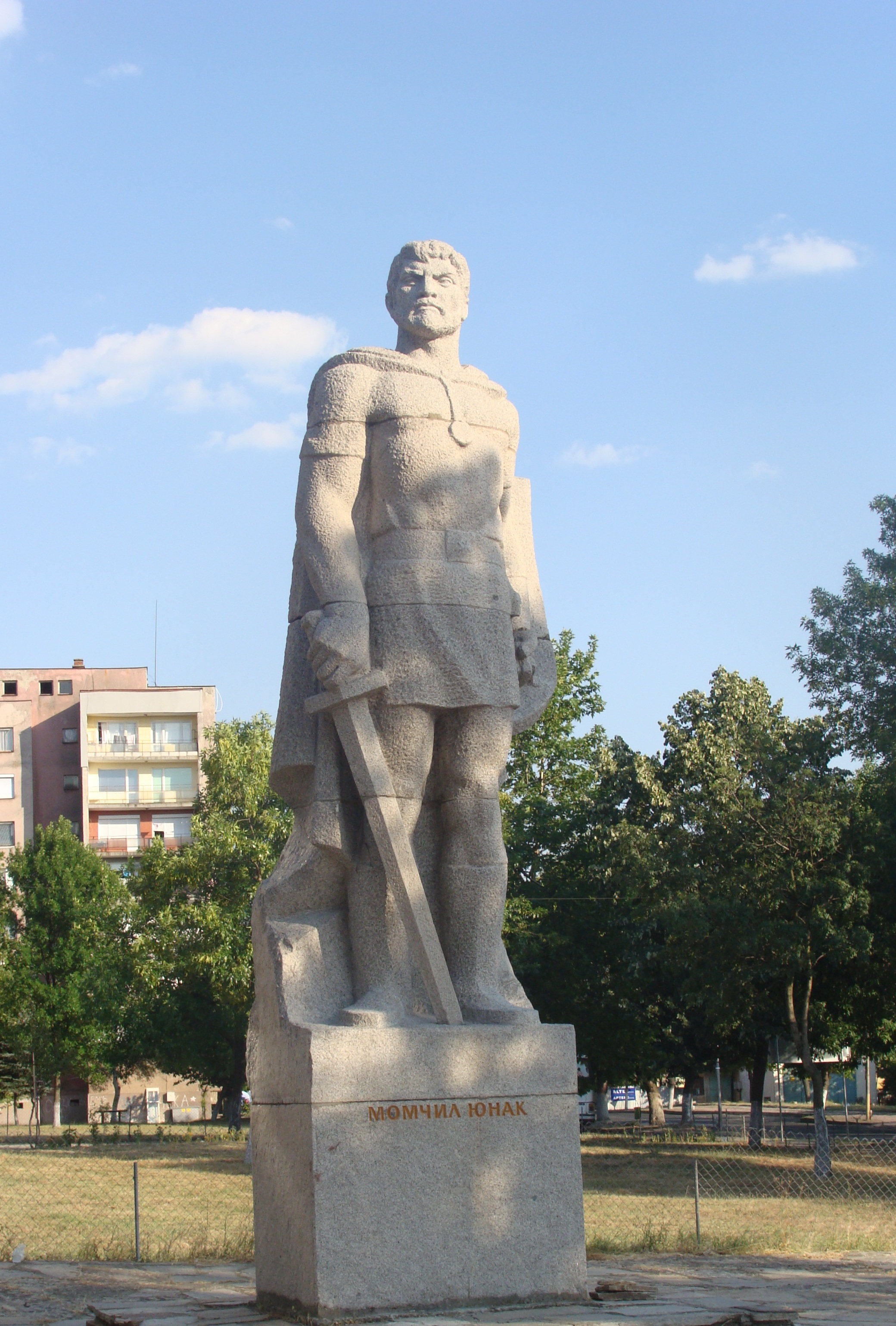 Monumento a Momchil en Momchilgrad, Bulgaria.